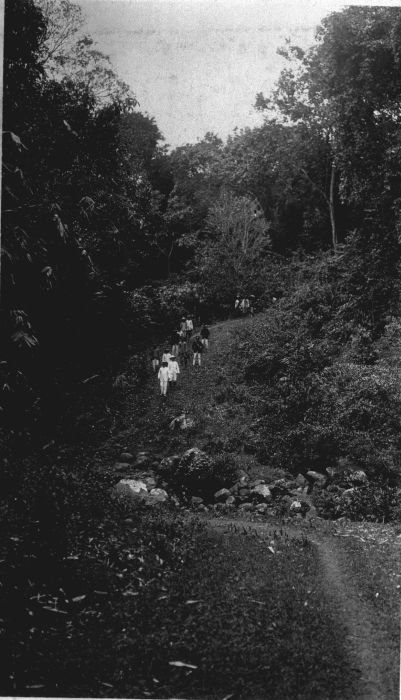 Foto. Landschap in de omgeving van Tjidaoen aan de zuidkust van de Preanger, West- Java